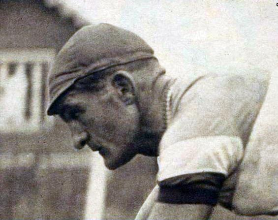 Louis Aimar (septembre 1941) - Couverture du Miroir des sports